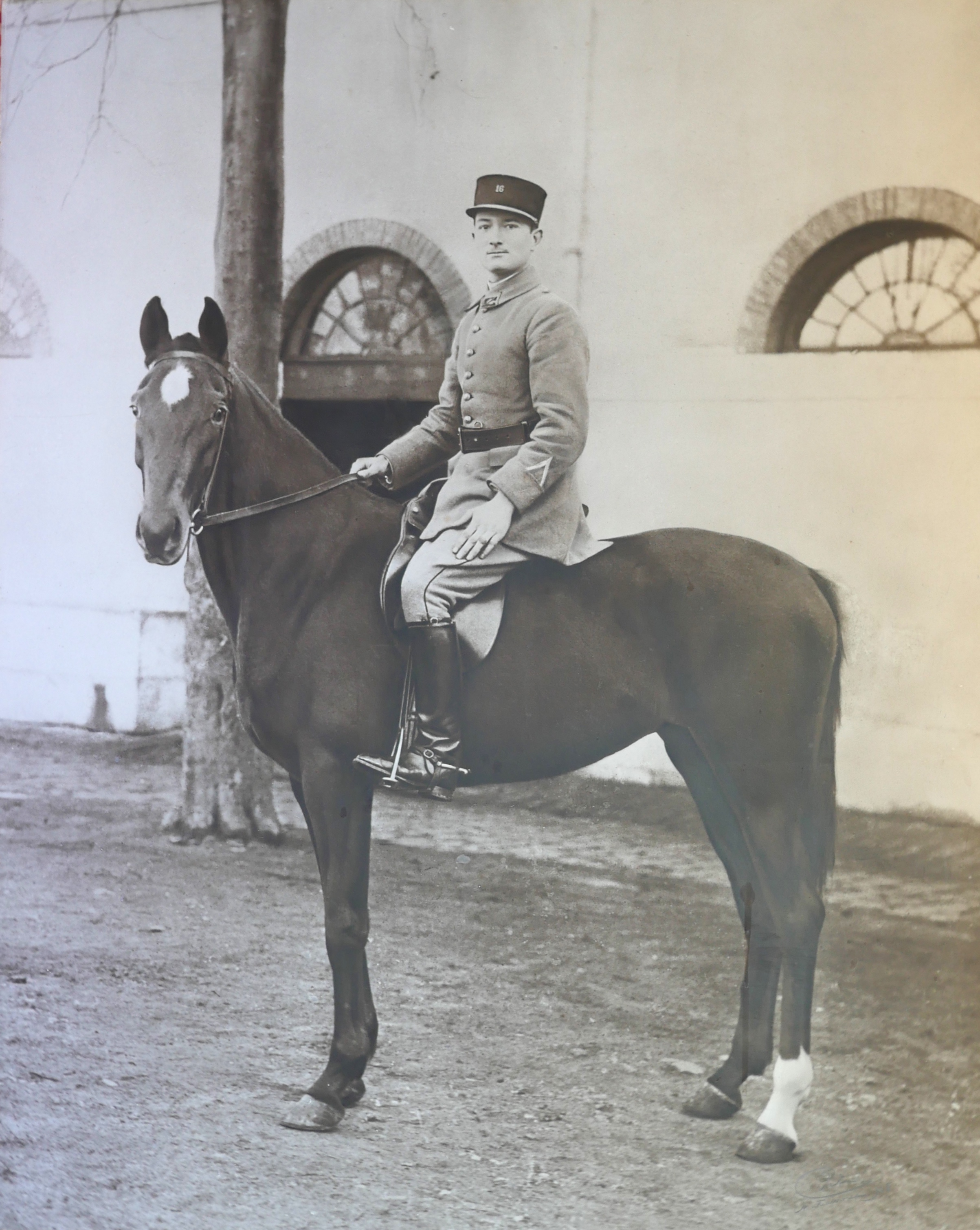 Cavalier du 16e Régiment de dragons et sa monture, le Maréchal des logis Charles Robin, en 1928 Saint Germain en Laye